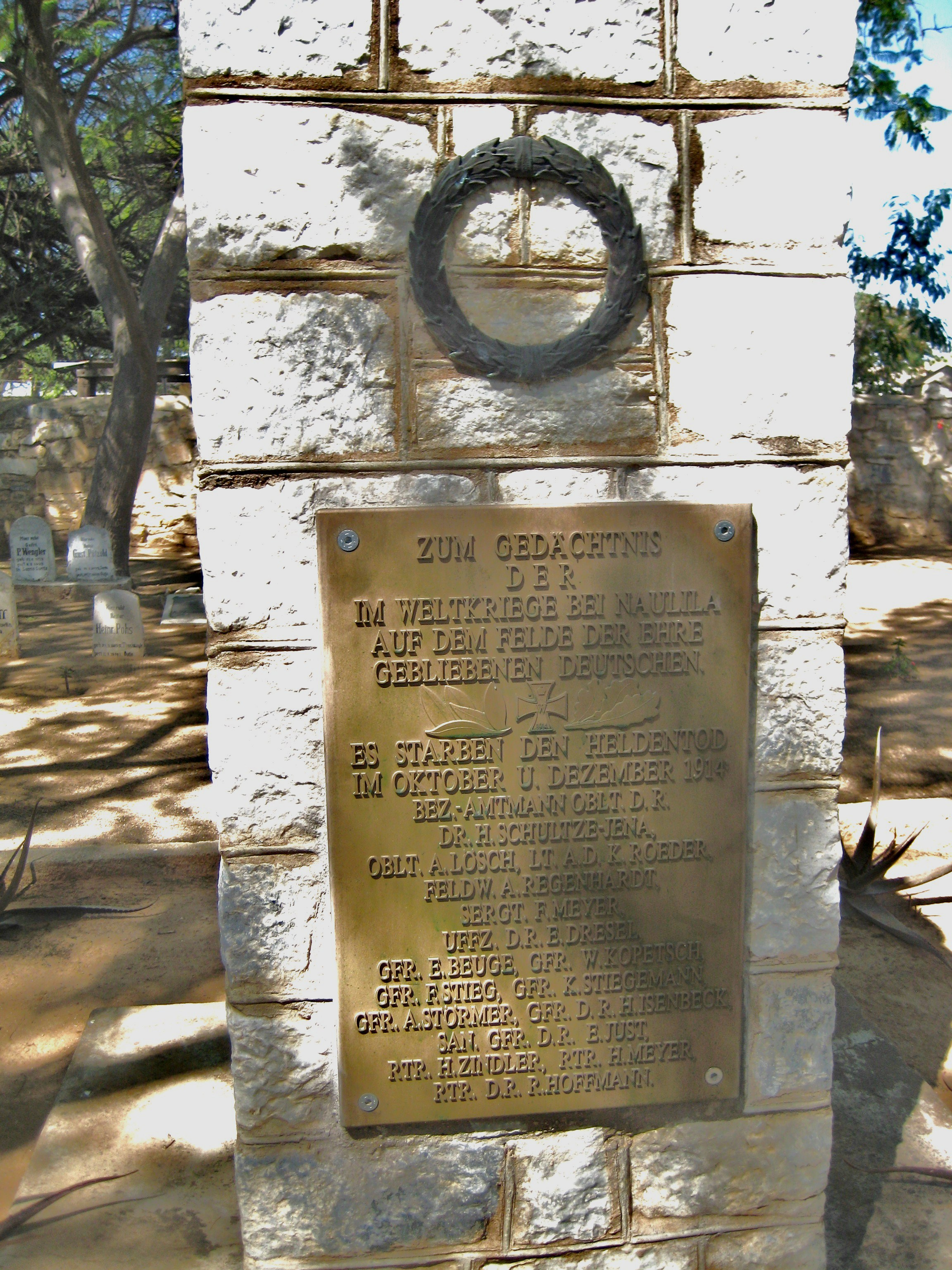 Denkmal in Outjo, Namibia, für Angehörige der Deutschen Schutztruppe, die im Oktober bzw. Dezember 1914 in Naulila, Angola, von portugiesischem Militär erschossen worden waren.